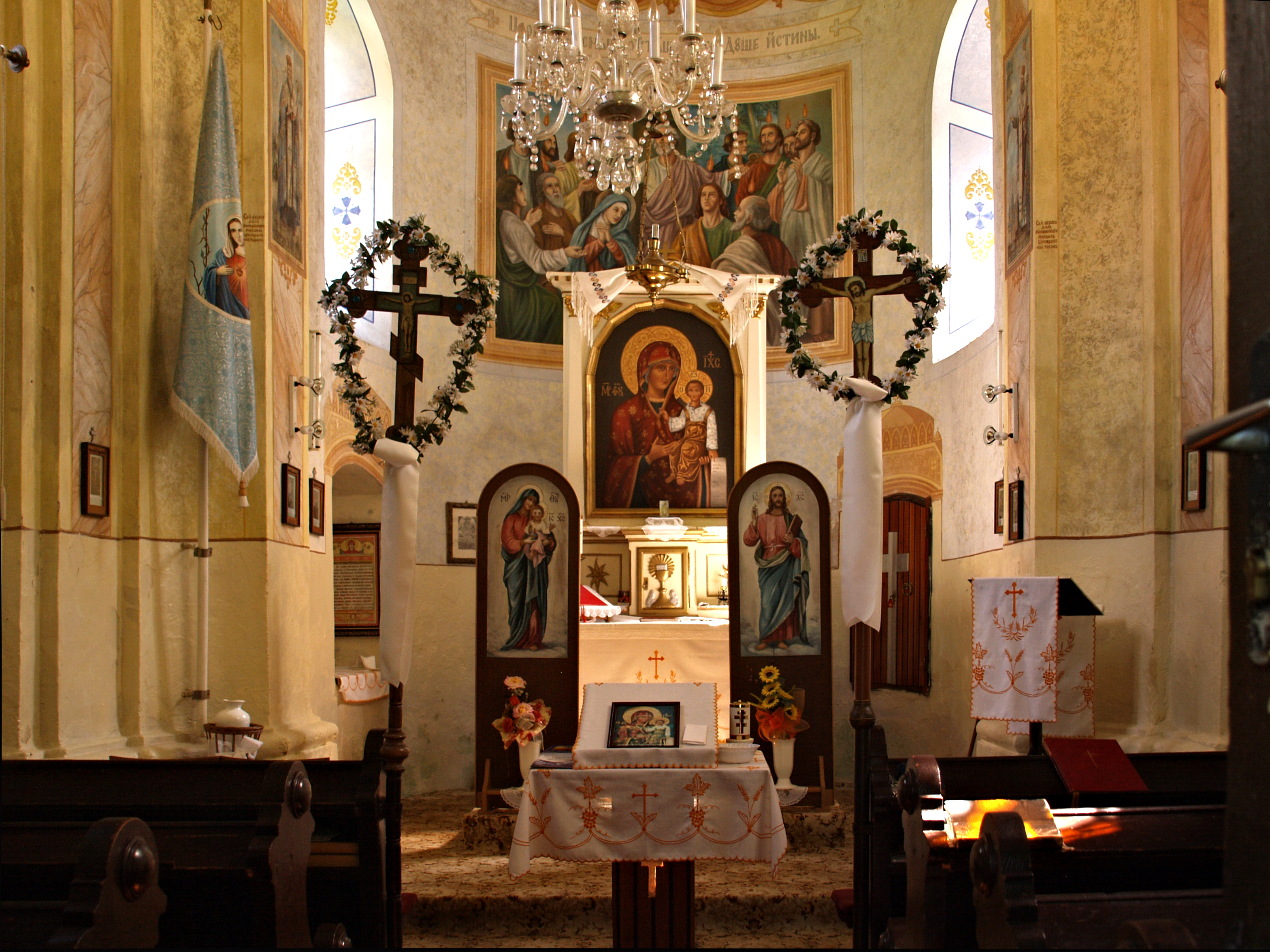 Krásny Brod, Prešov (Slovaquie) - Inéteiur de la chapelle dédiée à la Très-sainte-Mère de Dieu This medium shows the protected monument with the number 705-130/2 in the Slovak Republic.